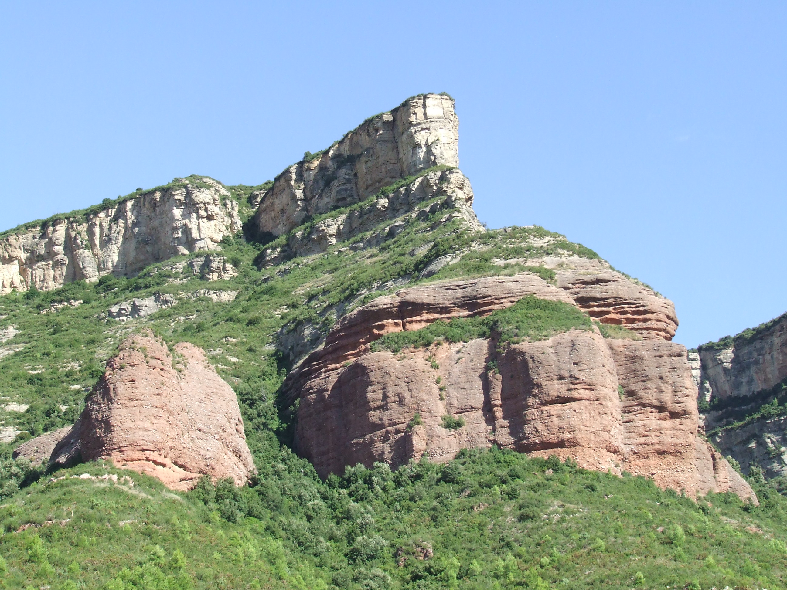 Turó de l'Ullar (Riells del Fai, Bigues i Riells, Vallès Oriental)